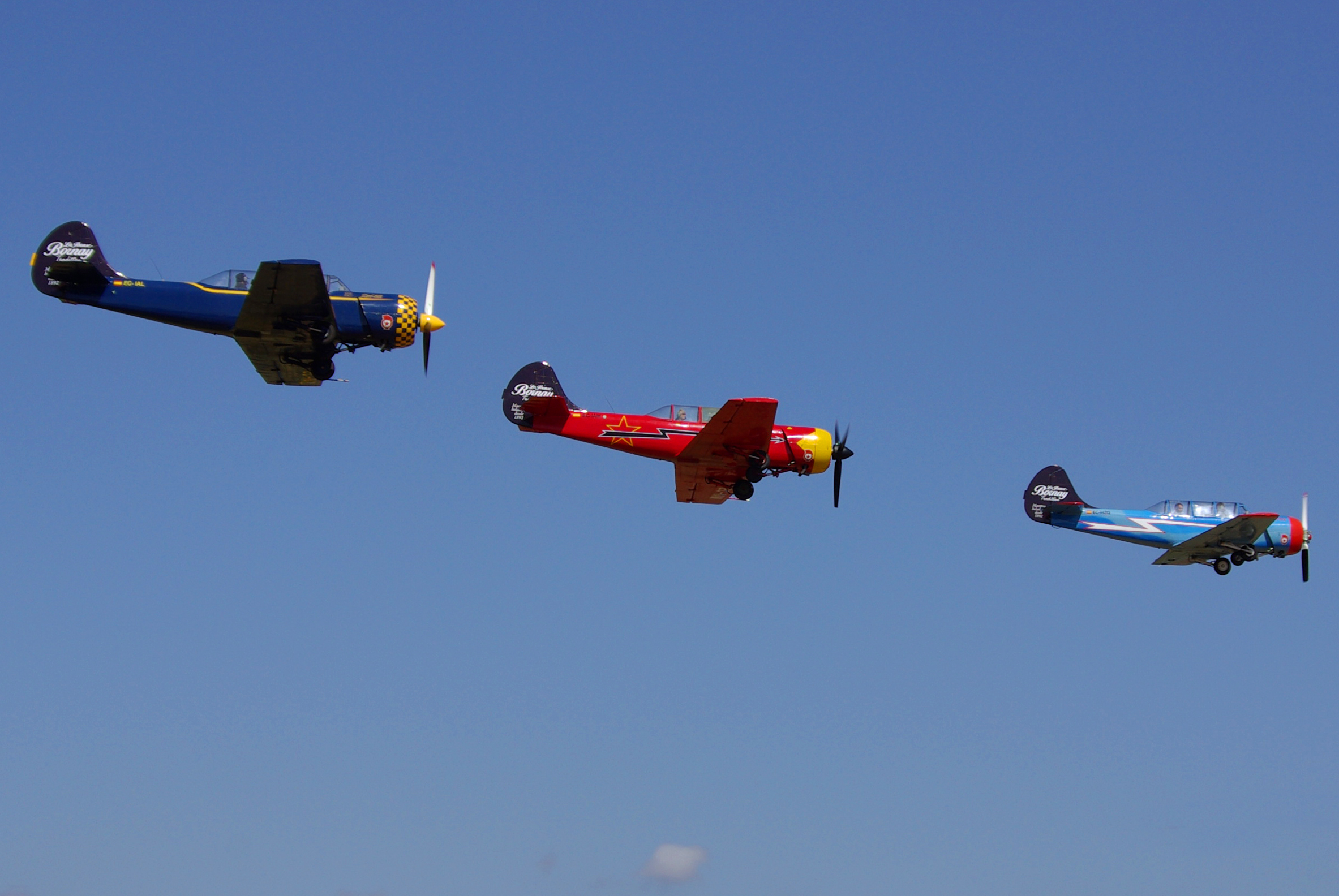 Tres Yak-52 de la Asociación Jacob 52 en formación sobre el aeródromo de Ses Salines, en Mallorca (España)